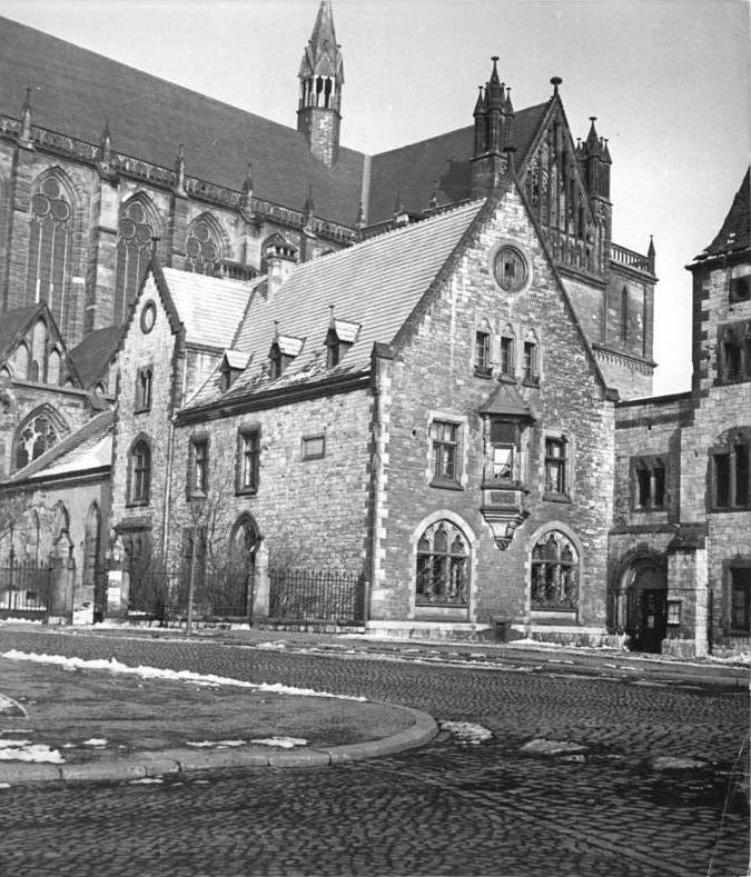 Zentralbild-Rösener Zi-Wjt 15.3.55 1 000 Jahre Magdeburger Dom Der Magdeburger Dom wird 1955 seine Tausendjahrfeier begehen. Die Schäden des Bombenkrieges werden zur Zeit durch umfangreiche Bauarbeiten beseitigt. UBz, Pfarrei des Magdeburger Domes - Sitz des Konsistoriums